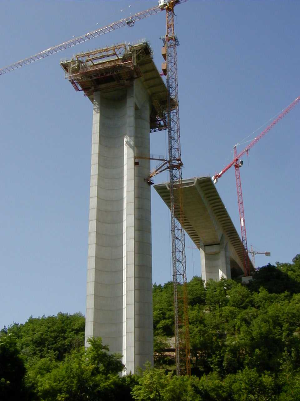 A20 - Viaduc de La Rauze - Construction - Piles P3 et P4